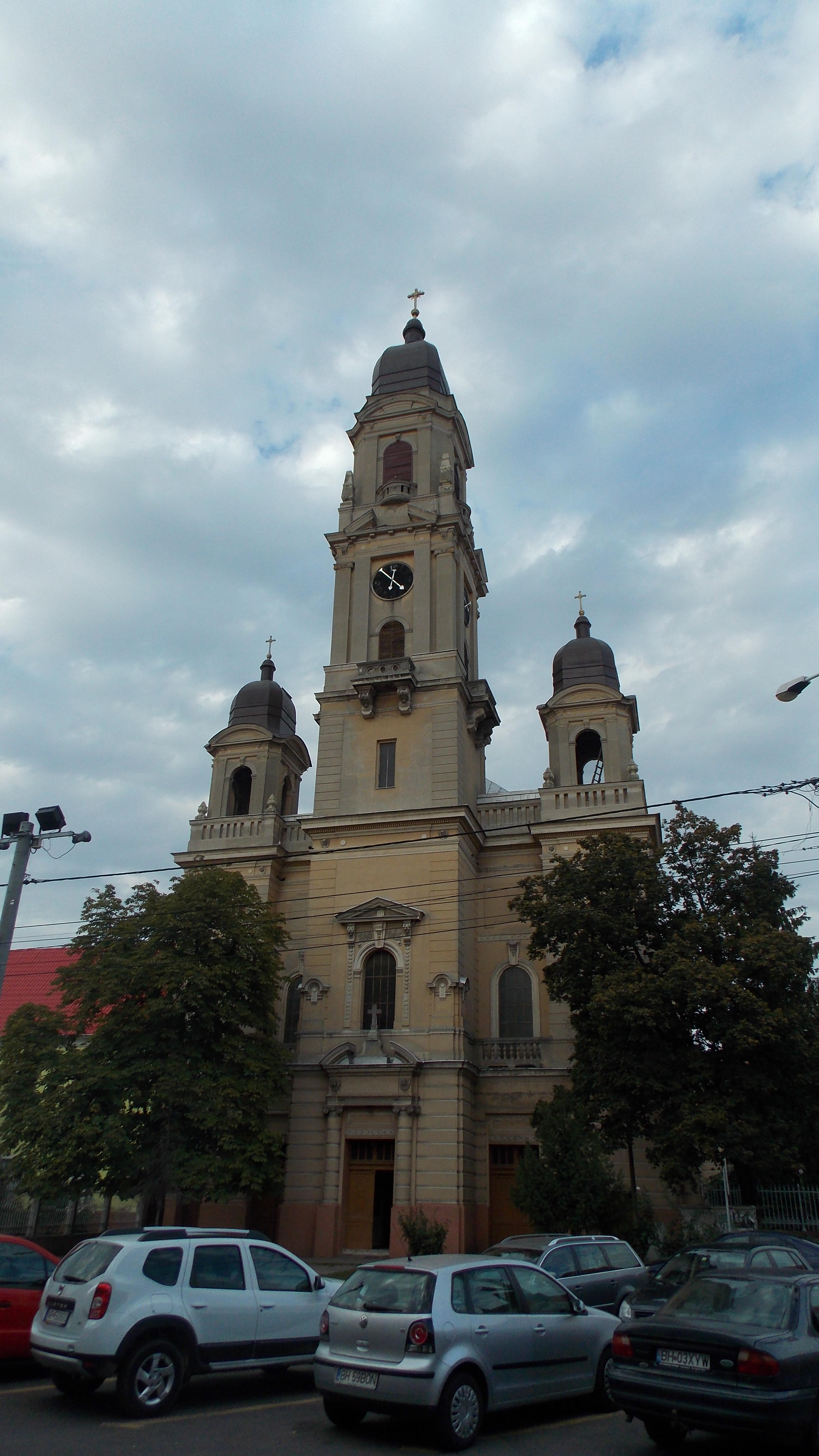 Biserica romano catolică "Pogorârea Sf. Spirit" - Oradea